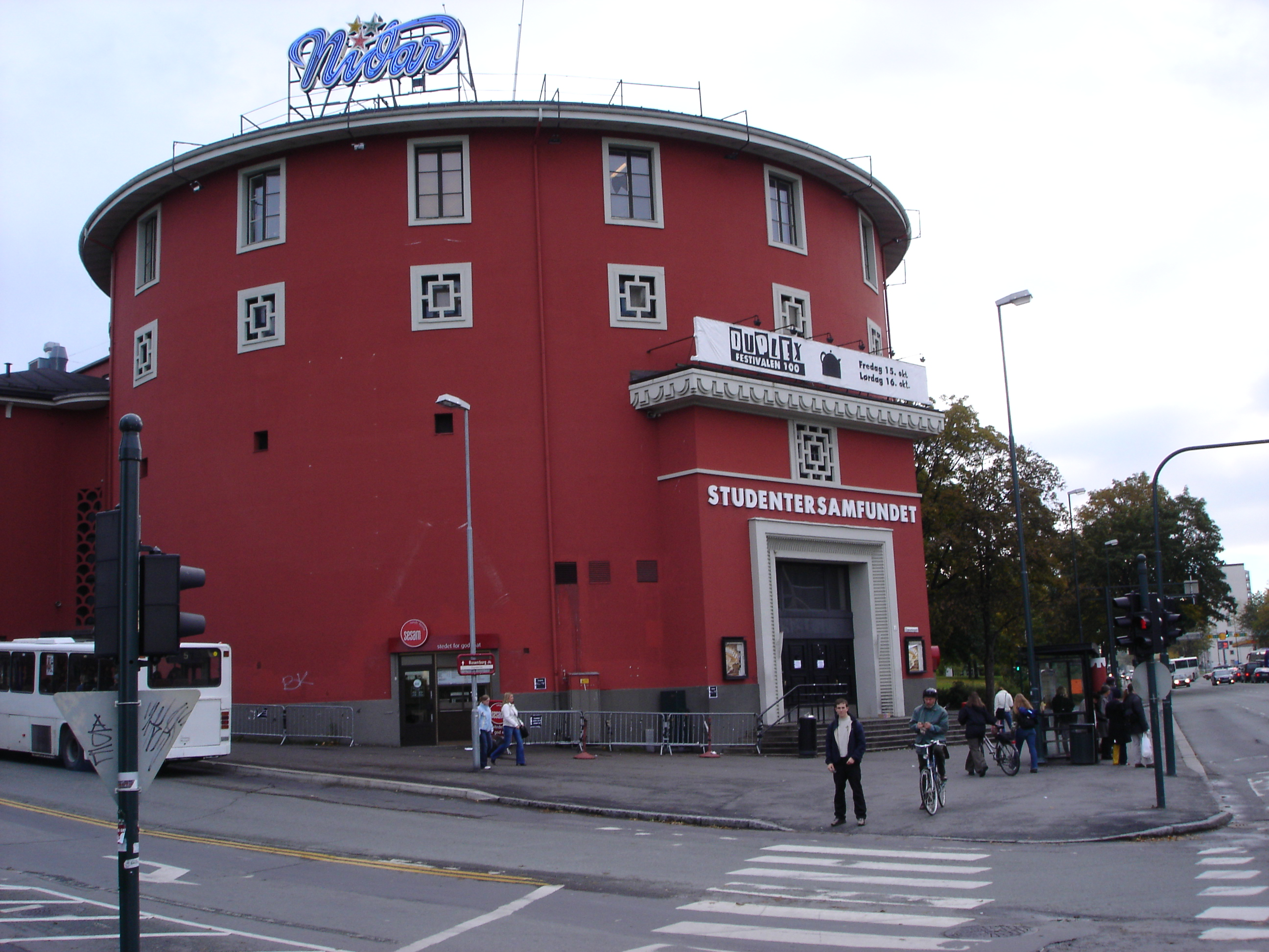 Studentersamfundet, Trondheim.